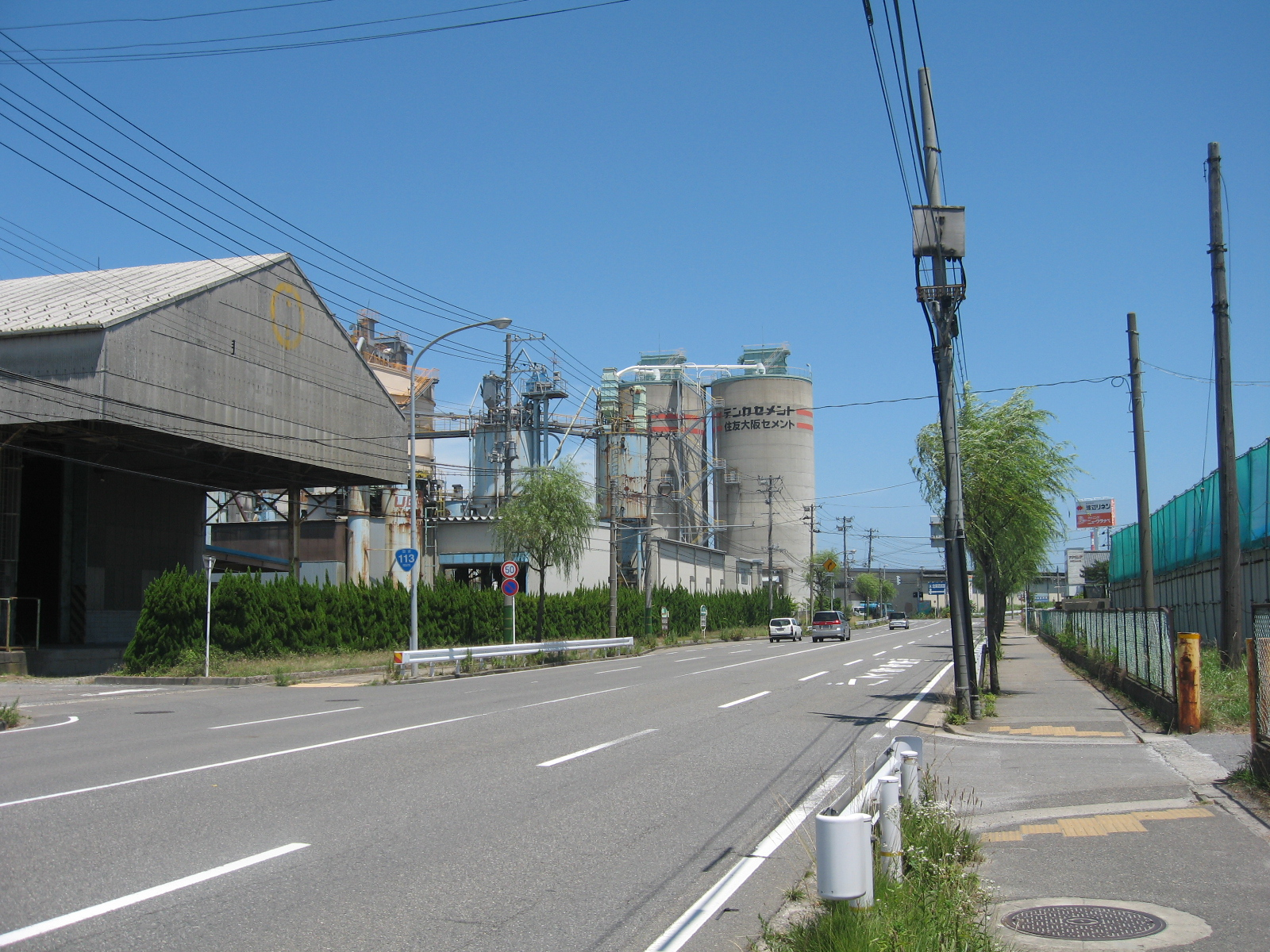 平日の竜が島一丁目の様子。